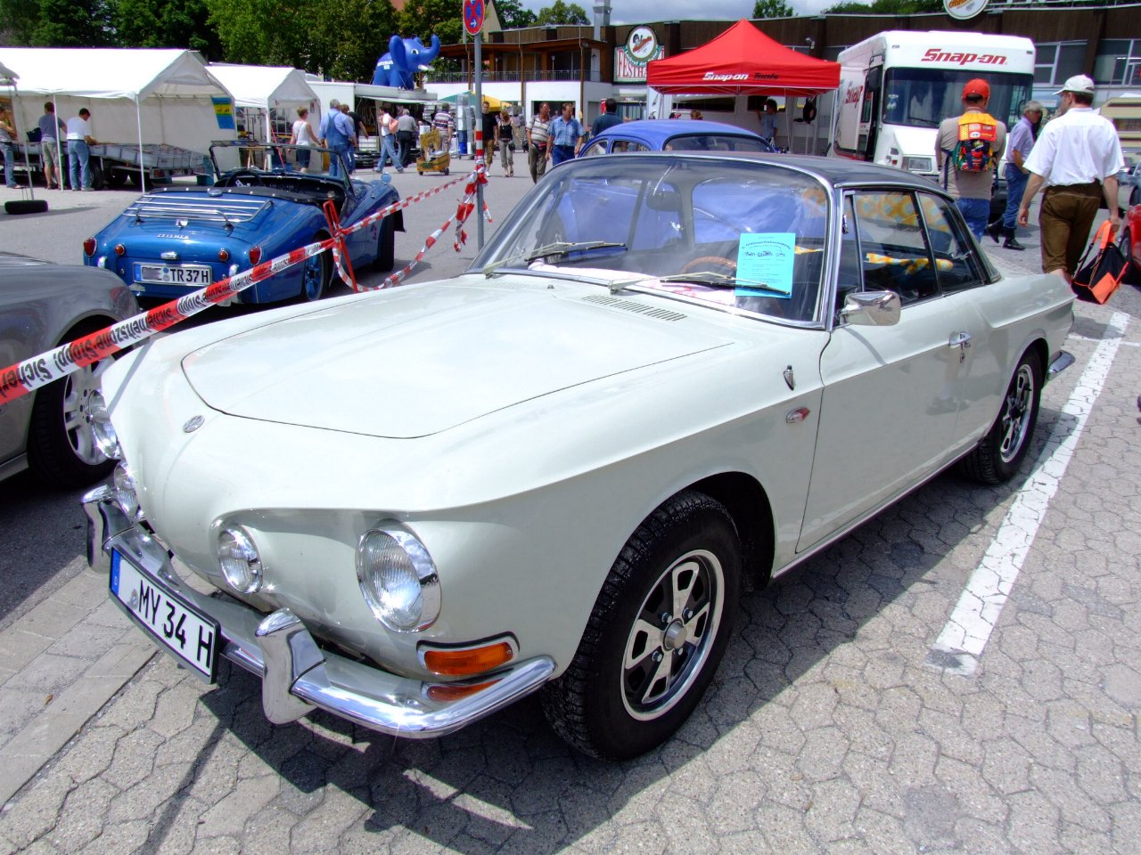 Quelle: selbst fotografiert, 07/2006 Fotograf: Späth Chr.